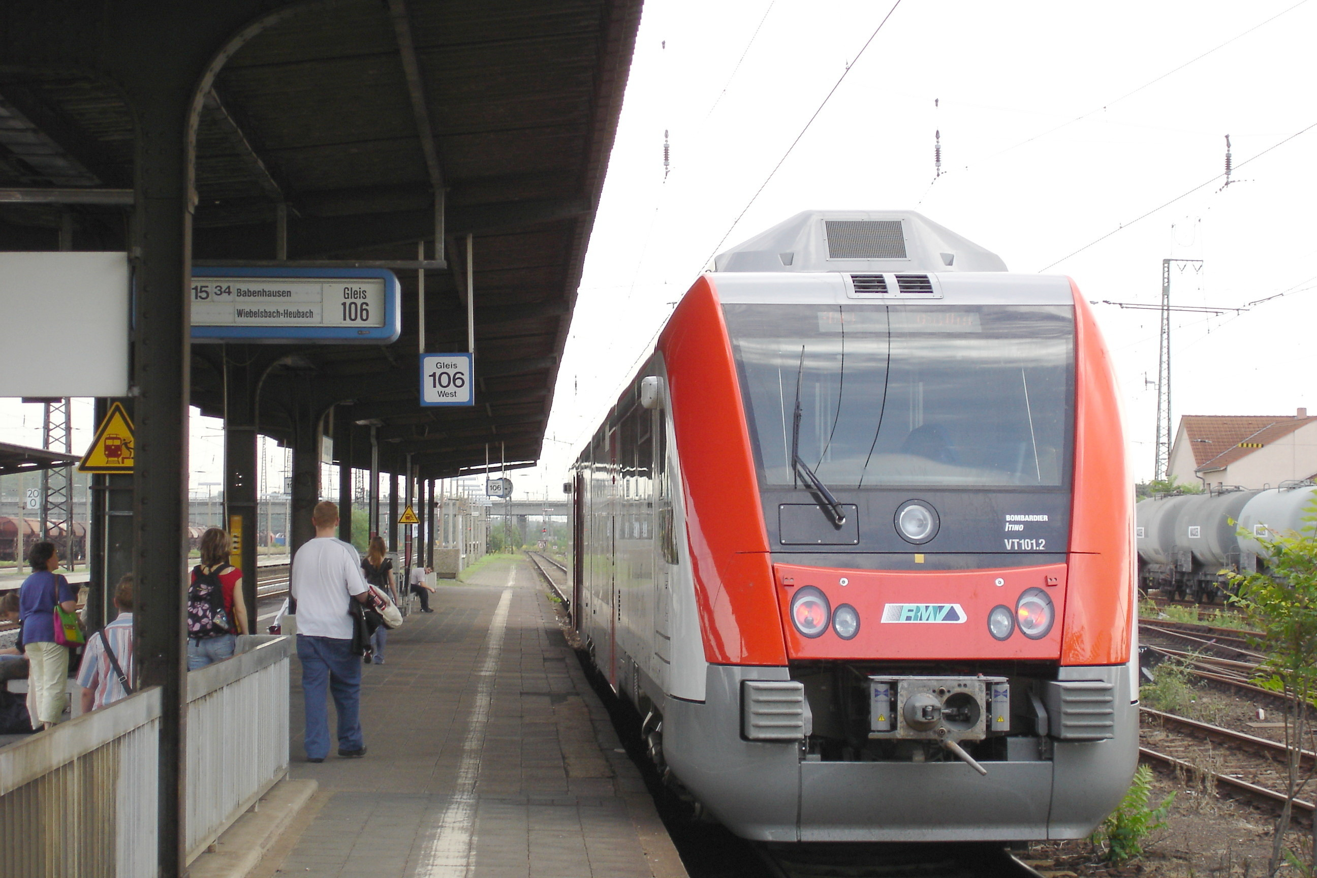 Hauptbahnhof Hanau am Main, Regionalzug Itino der Odenwaldbahn